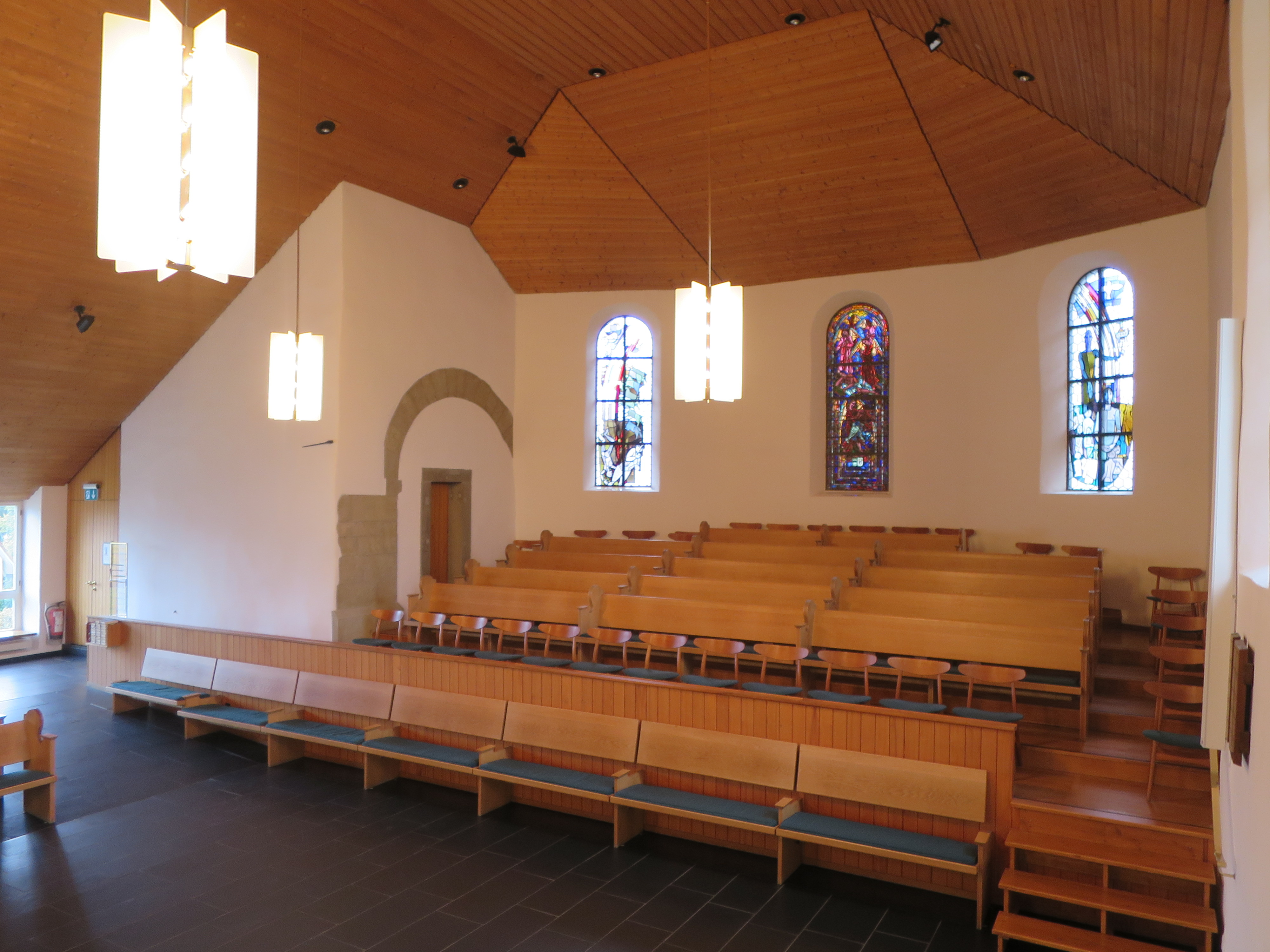 Ref. Kirche Rüschlikon - Blick nach Süden